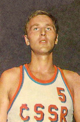 CAMPIONI DELLO SPORT PANINI 1970 1971 JIRI ZIDEK PALLACANESTRO